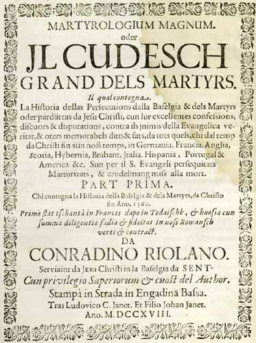 Rumantsch: Frontispizi dal Martyrologium magnum da Conradin Riola